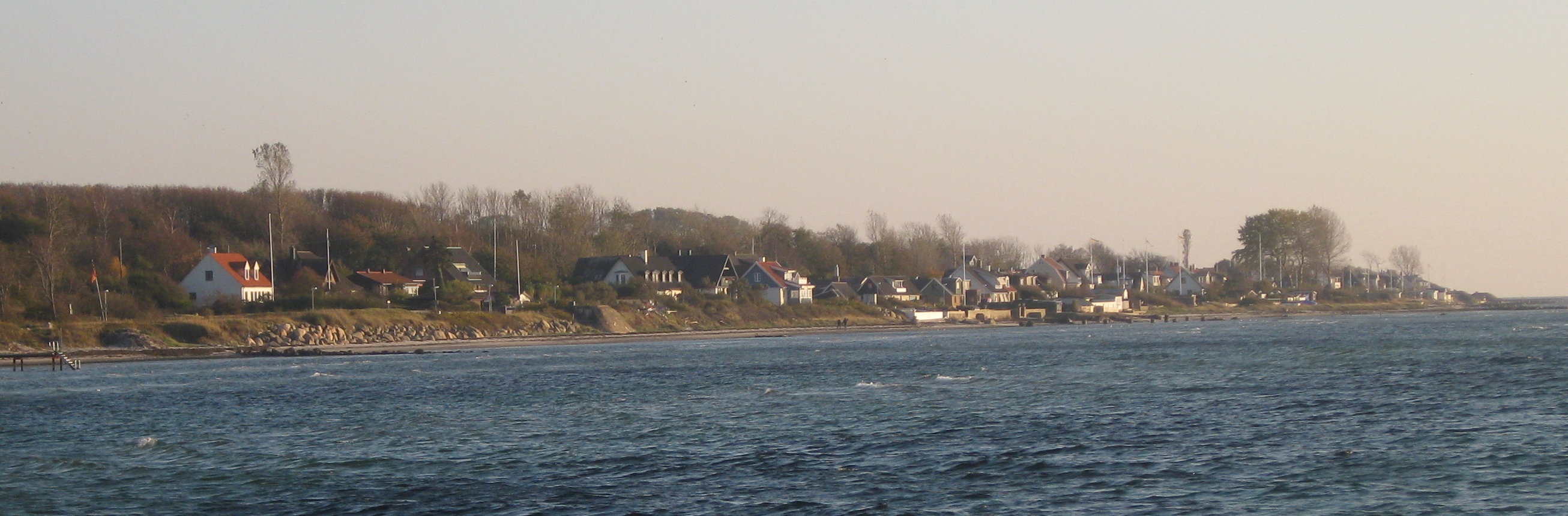 Fortuna från Rydebäcks brygga, Helsingborgs kommun, Skåne